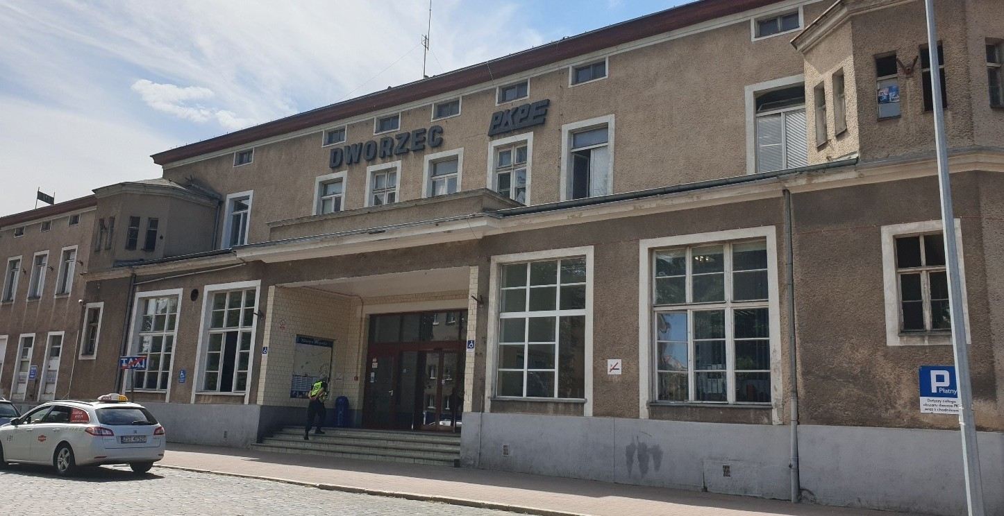 Stargard. Dworzec PKP